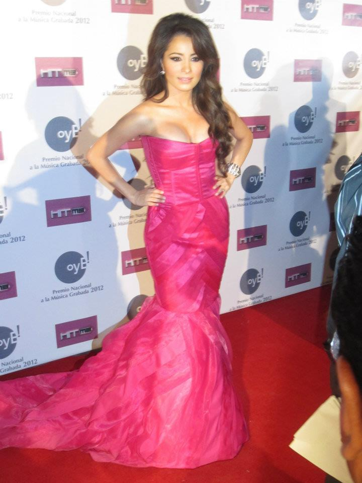 Cynthia en la entrega de los pemios Oye! 2012